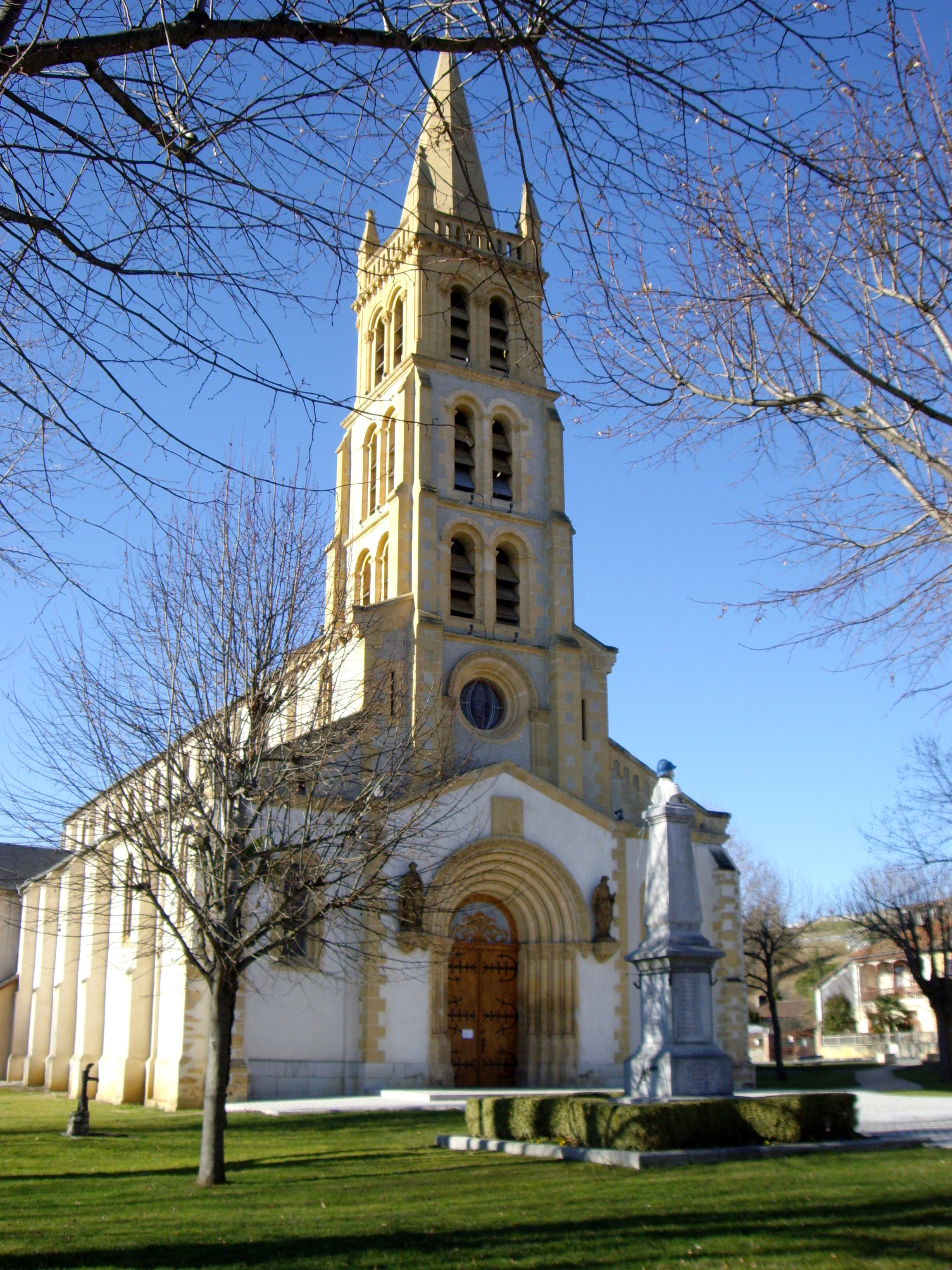 Église de Villeneuve-de-Rivière (31)